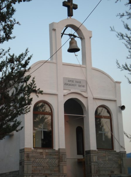 Ιερός Ναός Ζωοδόχου Πηγής Κυργίων Δράμας